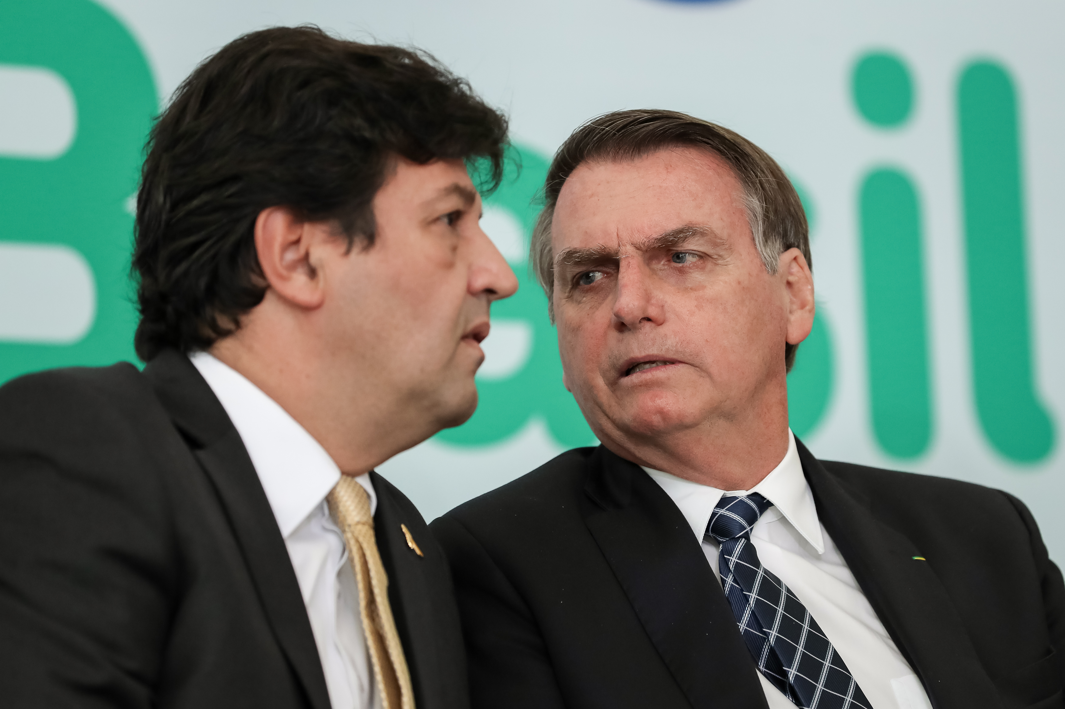 (Brasília - DF, 01/08/2019) Cerimônia de Lançamento do Programa Médicos pelo Brasil. Foto: Marcos Corrêa/PR